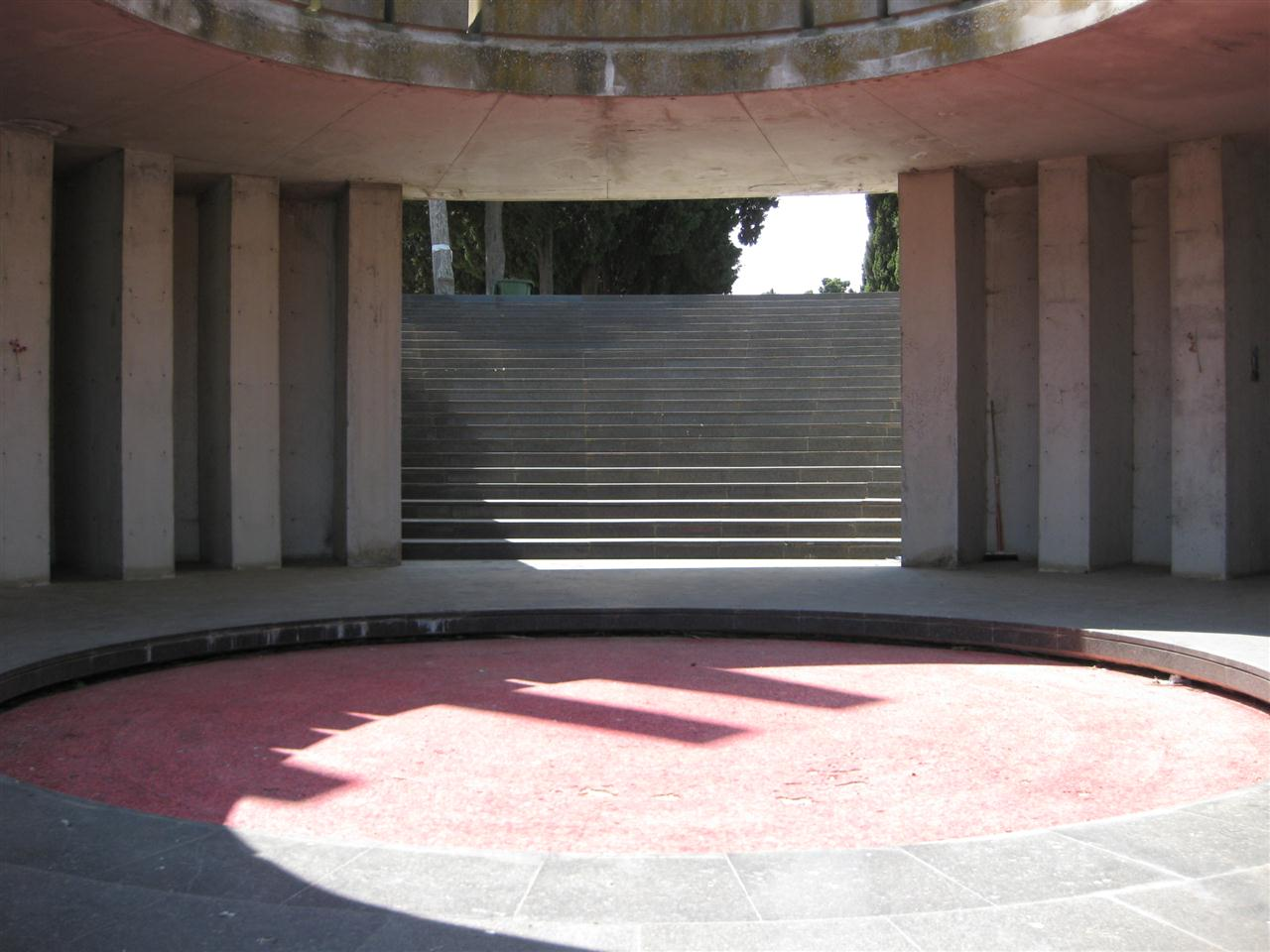 Ossario Commemorativo dei Caduti Slavi, costruito nel cimitero di Barletta alla fine degli anni sessanta su iniziativa del Sindaco Michele Morelli ed inaugurato il 4 luglio 1970. Progettato dallo scultore Dušan Džamonja, Custodisce i resti di 825 morti e di altri 463 combattenti dei quali non erano state reperite le spoglie, per un totale di 1288 caduti slavi. Di grande impatto è l'apertura circolare nel pavimento della sala principale, rivestito da un mosaico di colore rosso vivo per simboleggiare il sangue versato dai combattenti jugoslavi in occasione della resistenza antifascista e antinazista italiana.